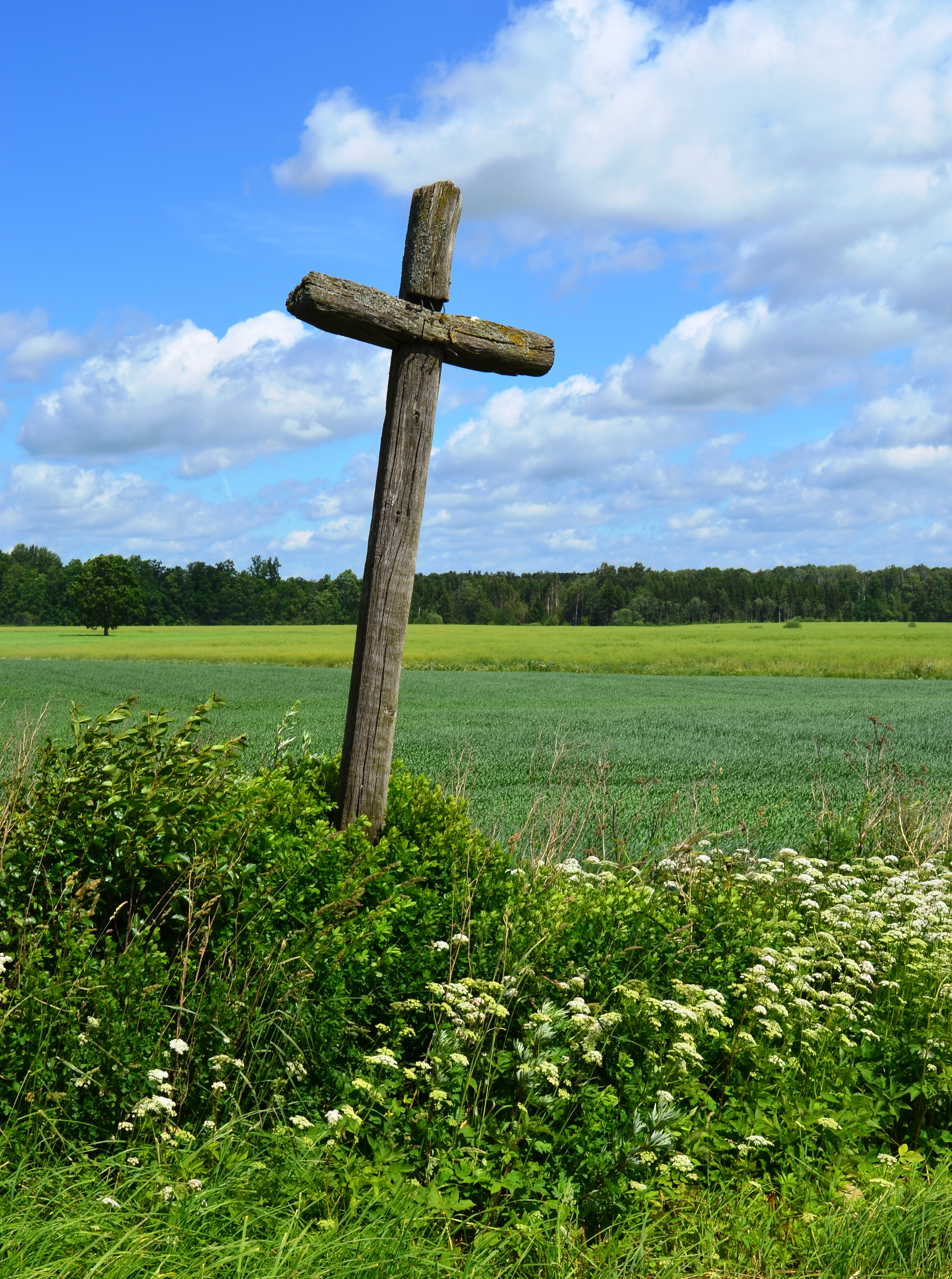 Kryžius, Jaugilka, Kėdainių raj.